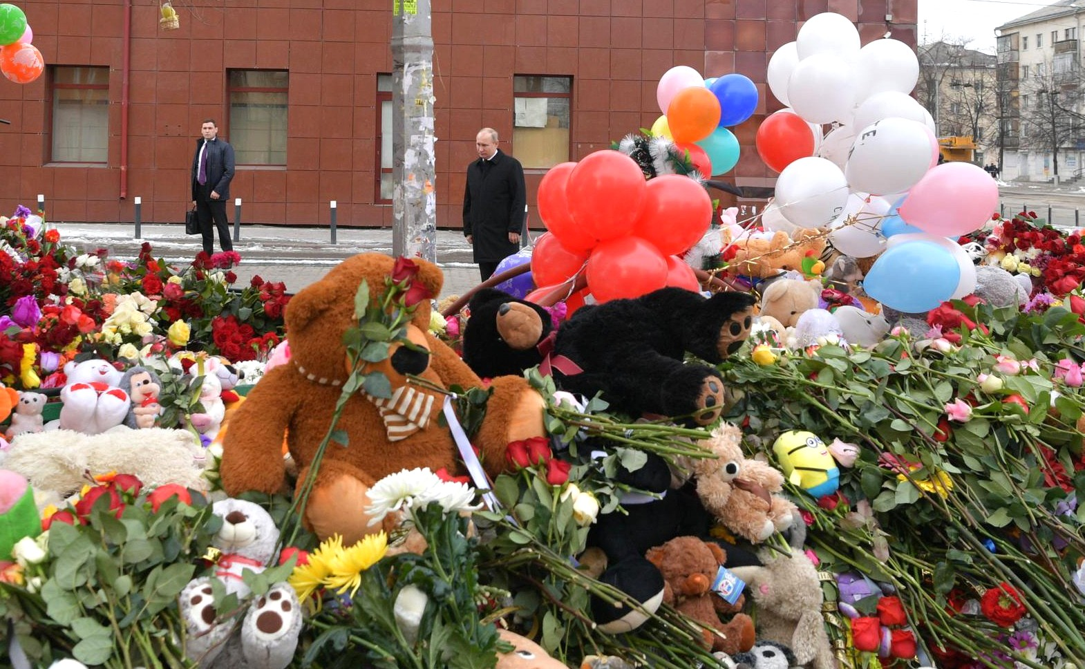 Президент России Владимир Путин прибыл в Кемерово, где при пожаре в торгово-развлекательном центре погибли более 60 человек. Глава государства почтил память погибших, возложив цветы к стихийному мемориалу у фасада здания.